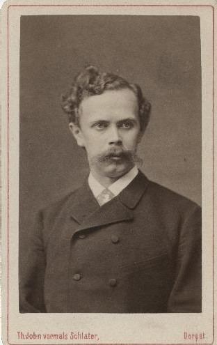 Carl Friedrich von Stern (* 18. Januar 1859 in Alt Salis in Livland; † 1. Februar 1944 in Posen) war ein balten-deutscher Historiker.